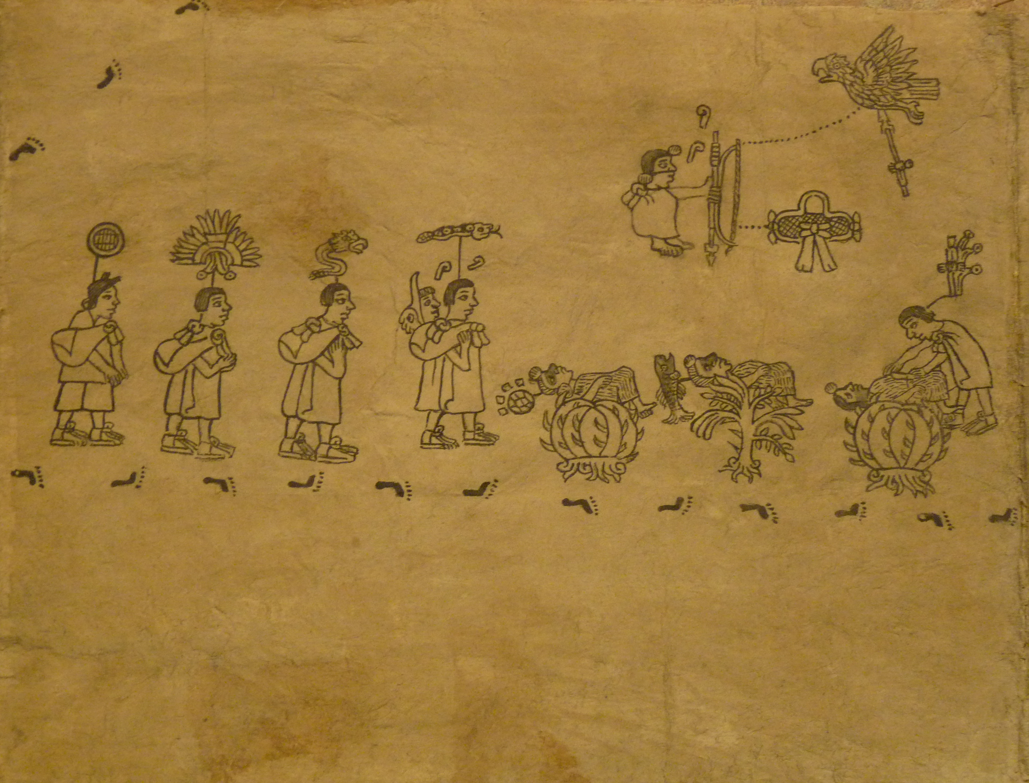 Codex Boturini (also known as Tira de la peregrinación), folio 4